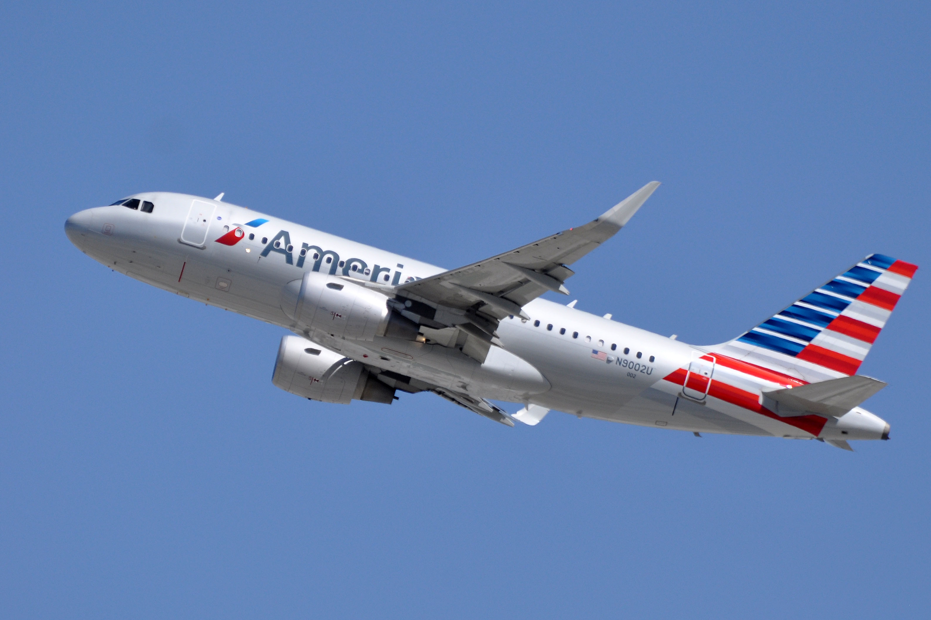 MSN 5698 A319-112 AMERICAN AIRLINES LAX AIRPORT